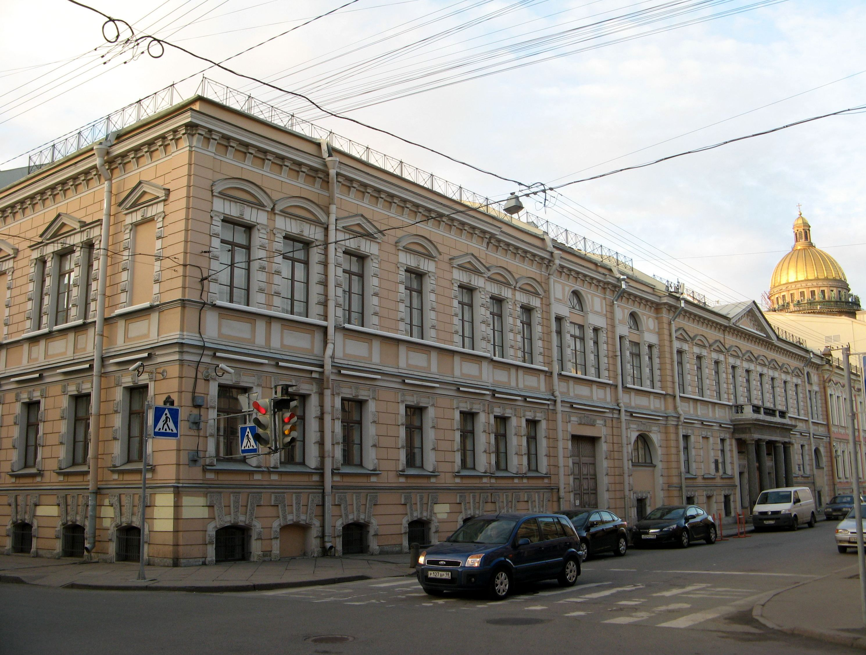 Дворец Безбородко А. А. (Санкт-Петербург, Почтамтская улица, 7, Почтамтский переулок, 4, Якубовича улица, 6, лит. А)